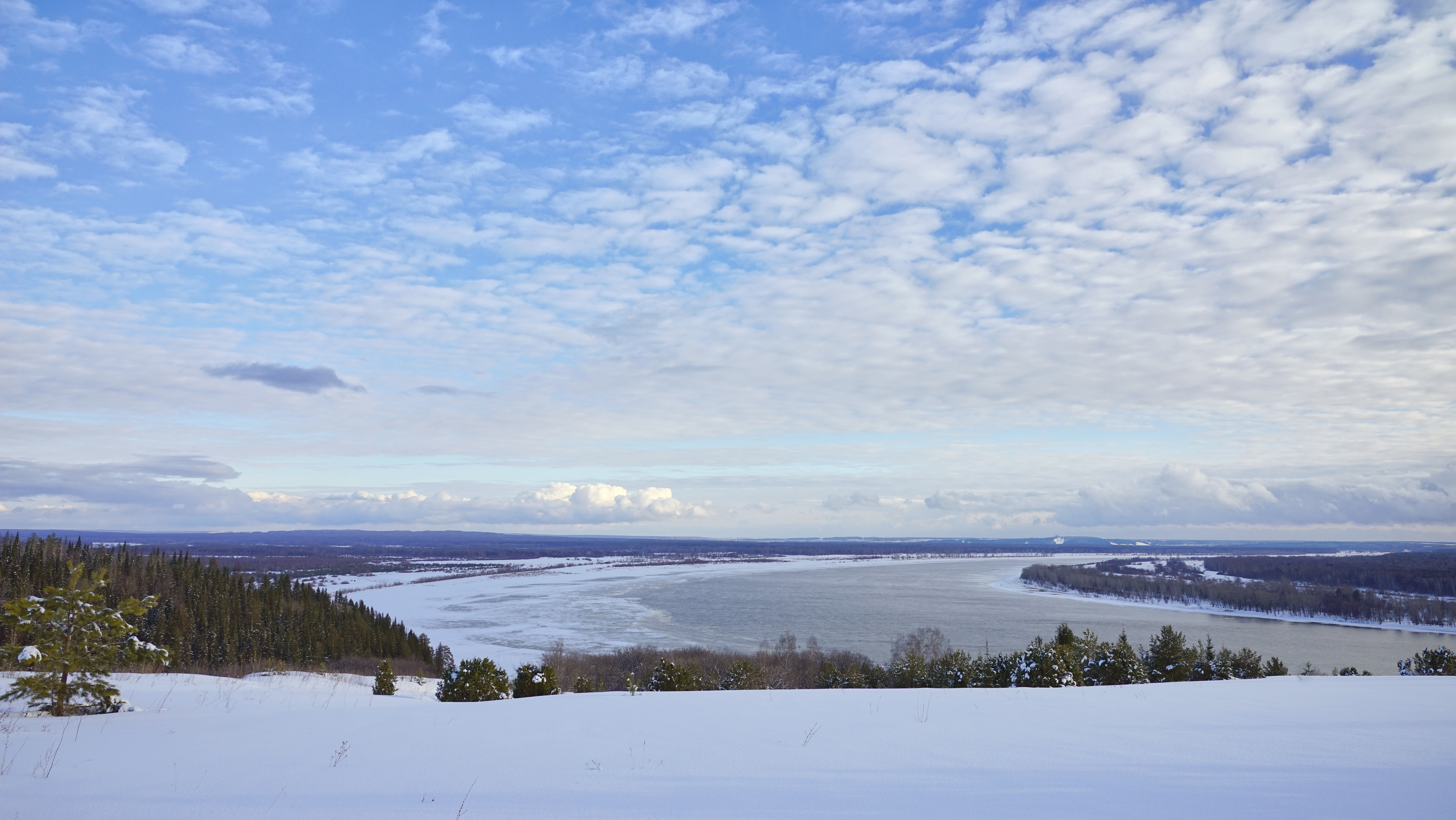 Нечкинский национальный парк: Расположен на территории трех административных районов: Воткинского, Завьяловского и Сарапульского. Занимает территорию в средней части долины реки Камы и прибрежную часть Воткинского водохранилища, Воткинский район, Удмуртия This image is related to the protected area of Russia number 1800028